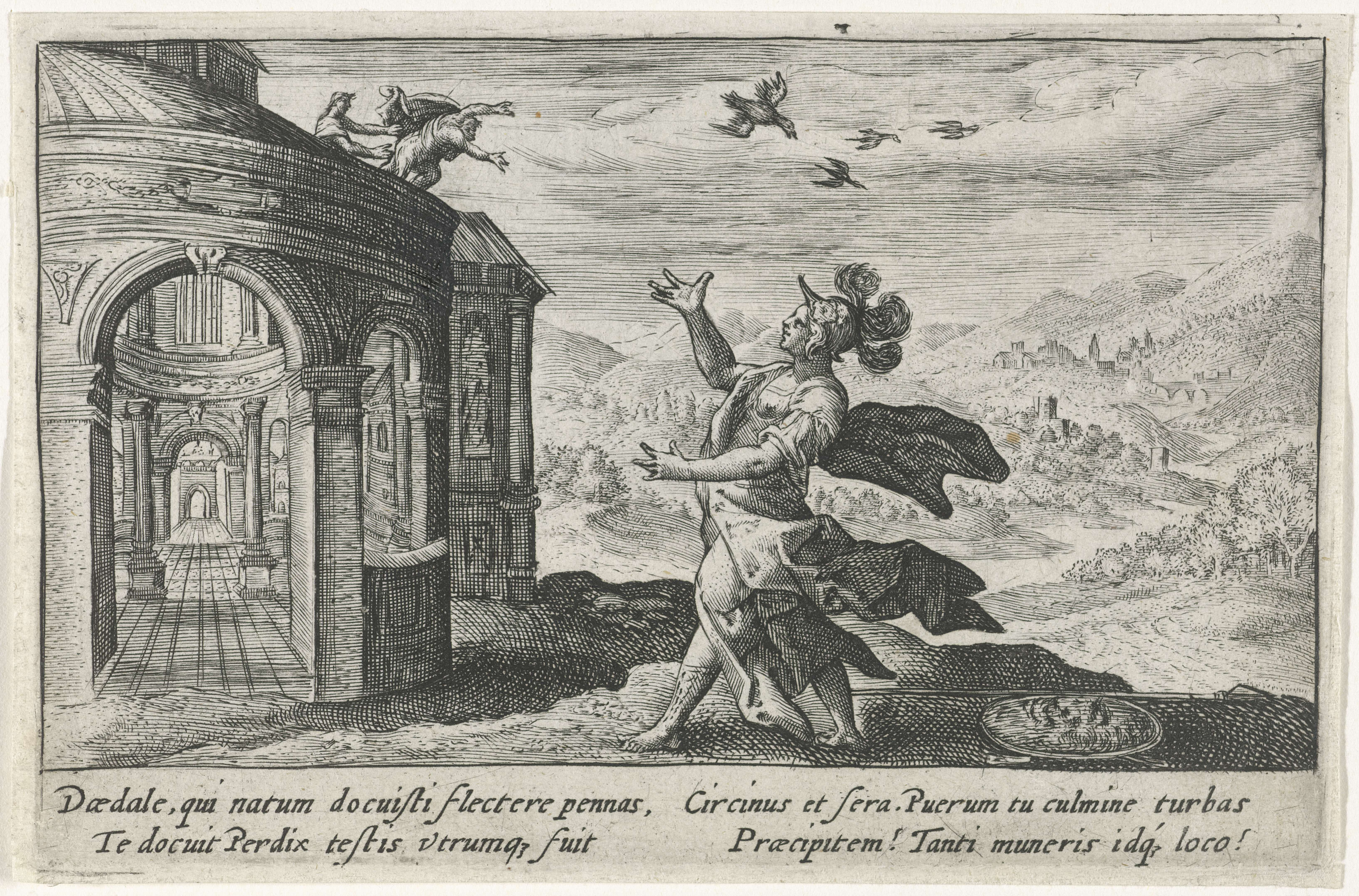 Daedalus is jaloers op Perdix en duwt hem van de tempel van Minerva. Minerva grijpt in en verandert Perdix in een patrijsvogel. In de marge een vierregelig onderschrift, in twee kolommen, in het Latijn.; Iconclasscode: 97D26; print